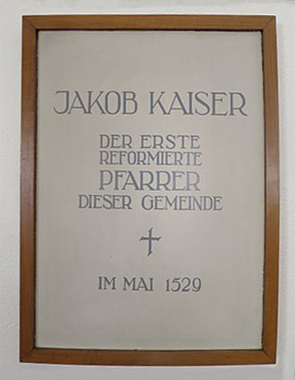 1812-1813 von Hans Conrad Bluntschi erbaut